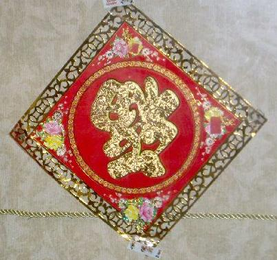 Fu Dao